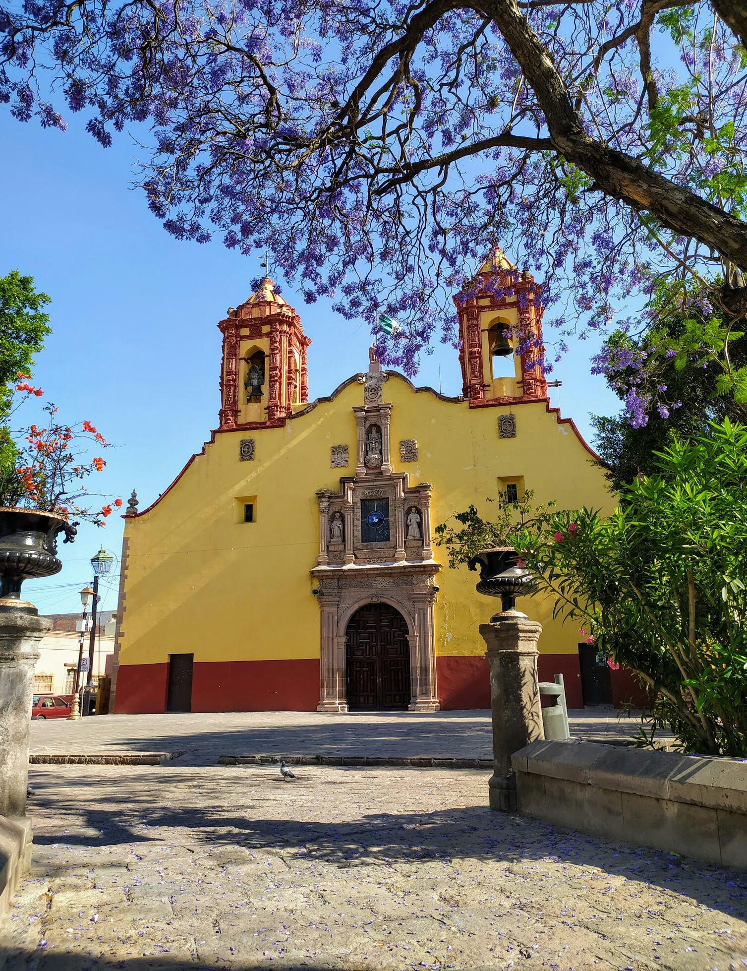 Templo de San Miguel arcángel en la ciudad de San Luis Potosí, México